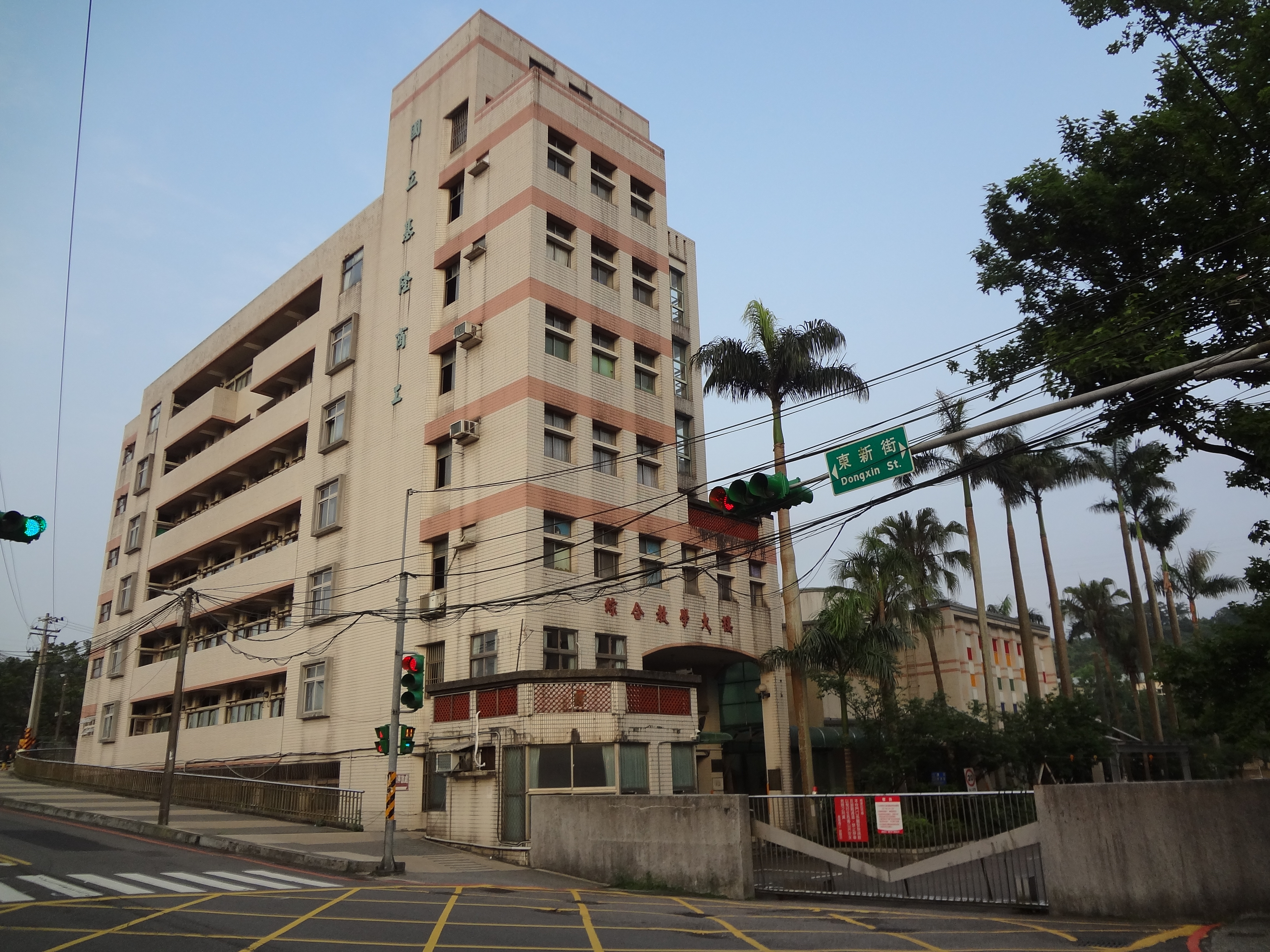 國立基隆高級商工職業學校綜合教學大樓與後門，位於基隆市七堵區東新街。